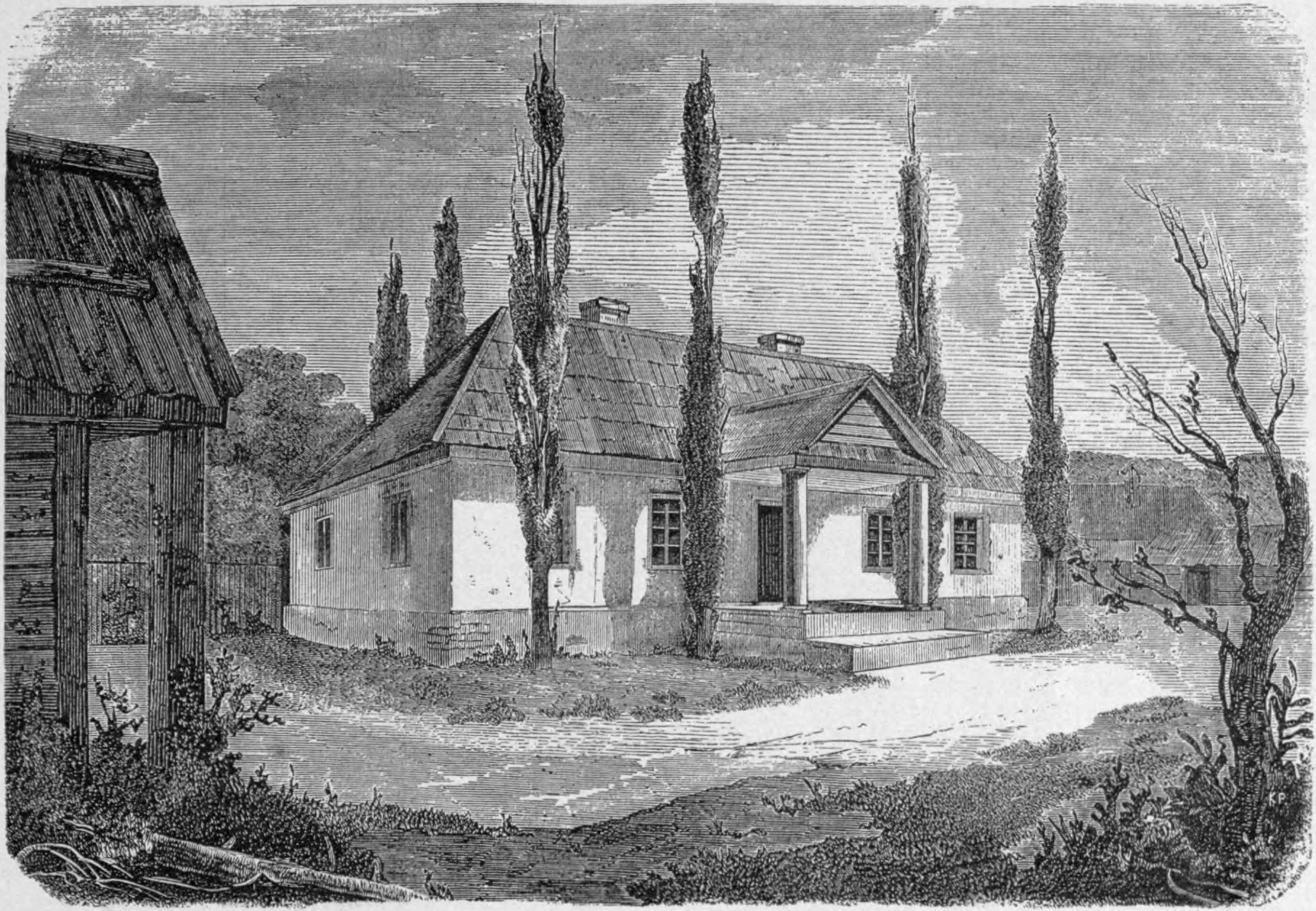 Беларуская (тарашкевіца): Наваградак (Navahradak), дом Адама Міцкевіча (Adam Mickievič)